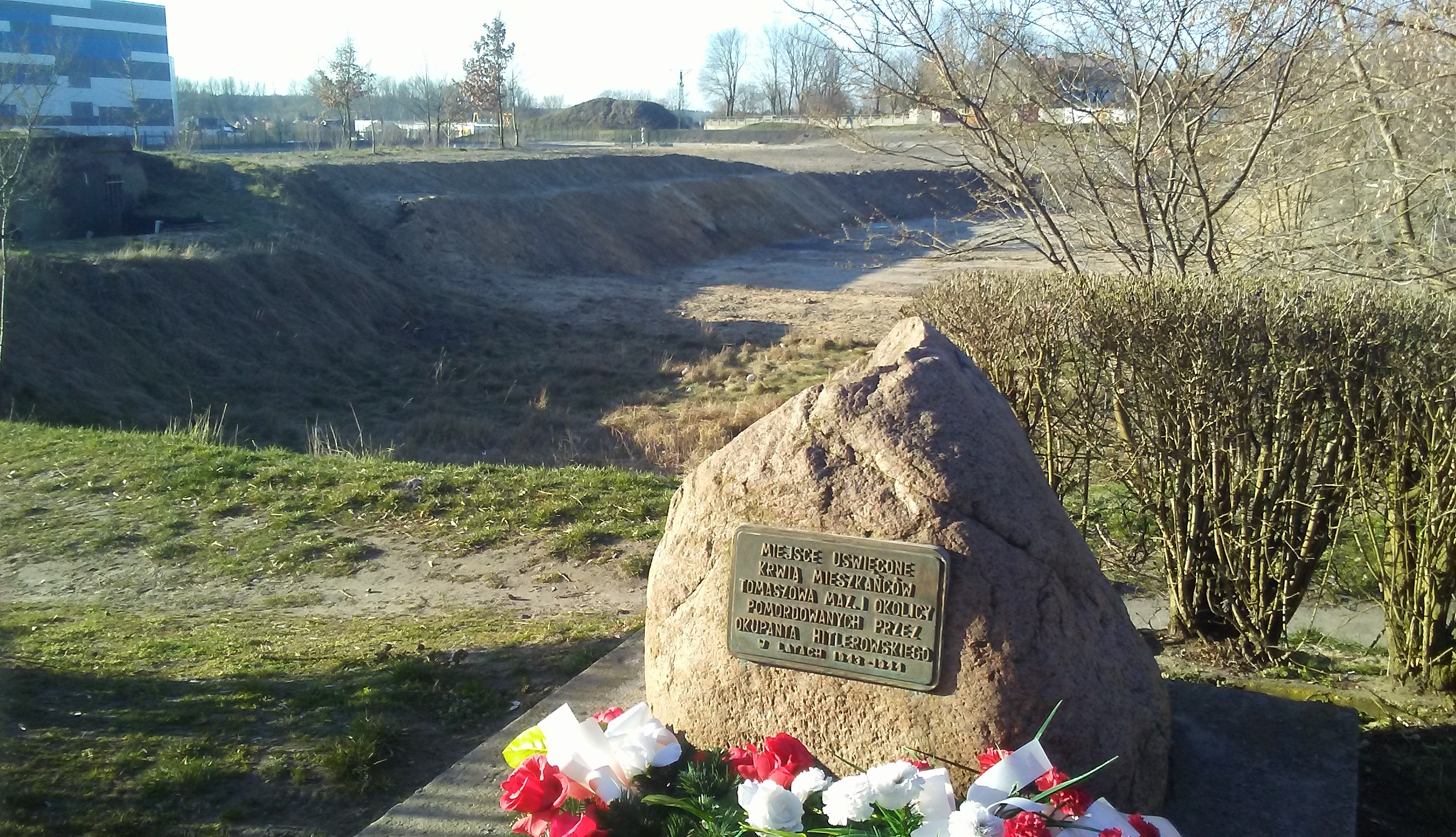 Ulica Strzelecka (pomiędzy dyskontem Bierdonka a Areną Lodową), głaz upamietaniajacy rozstrzeliwania mieszkańców Tomaszowa i okolic przez Niemców w latach 1943-1944